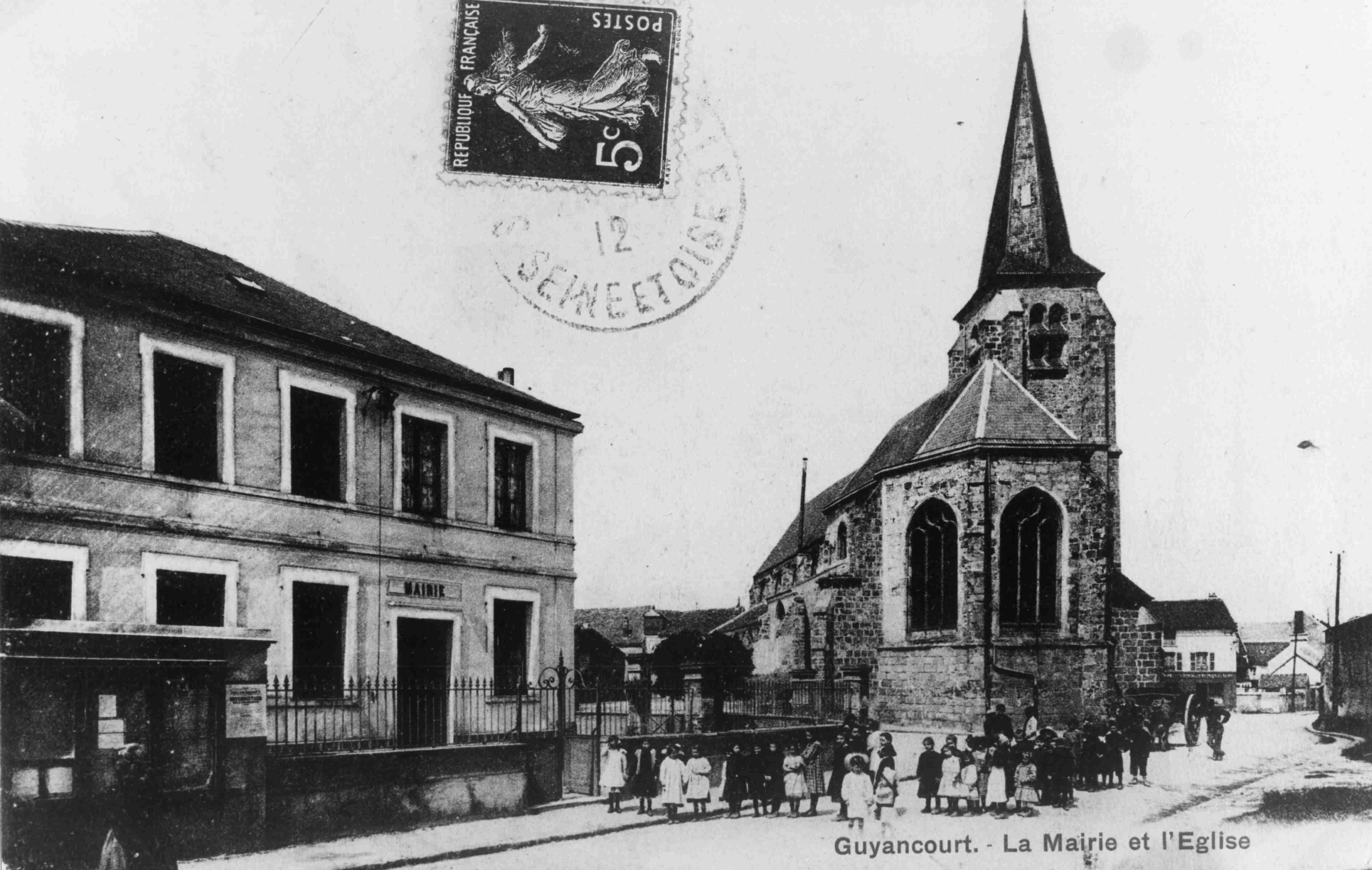 La Mairie-Ecole et l'église en 1912. Carte Postale de 1912